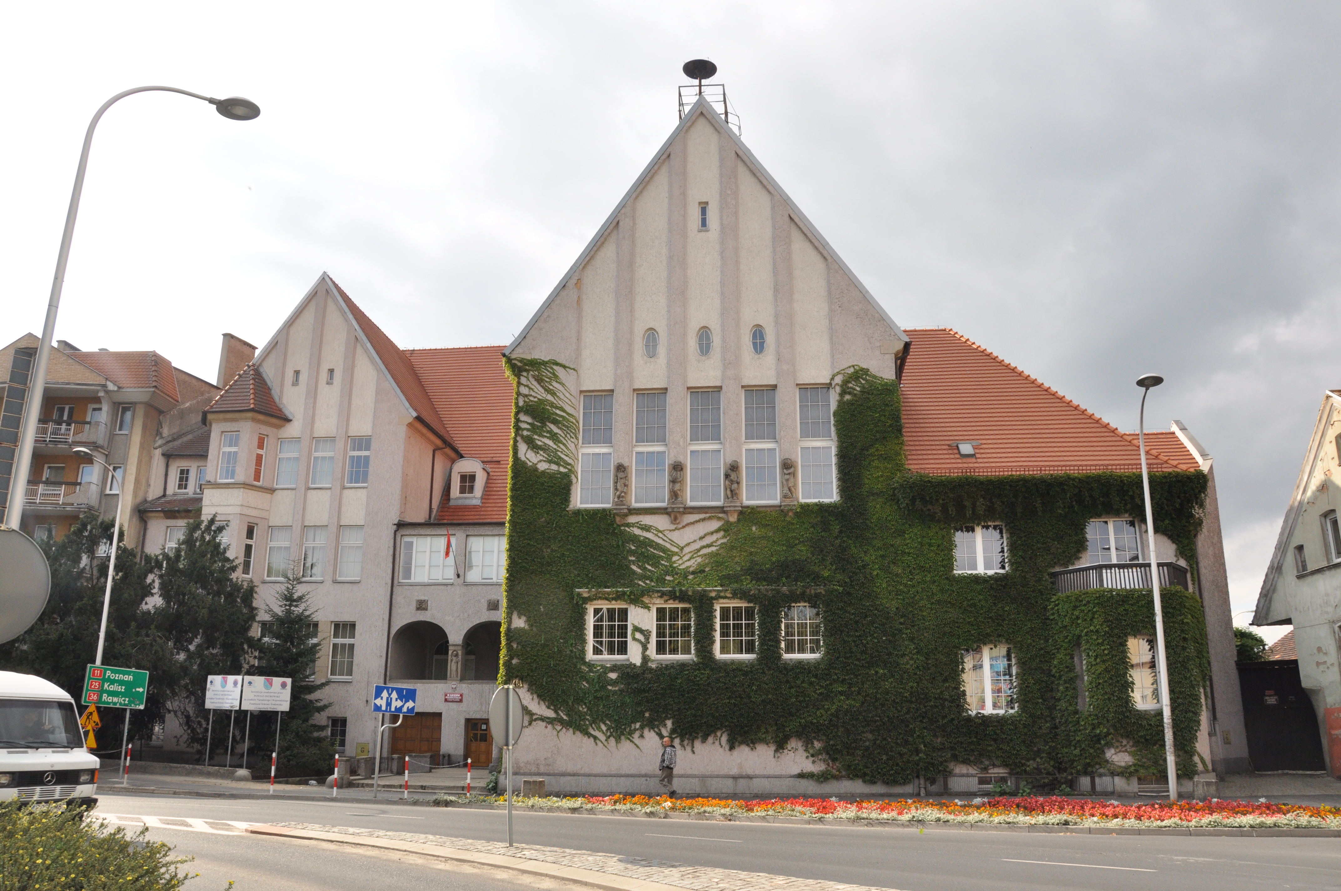 Ostrów Wielkopolski, ul. Wrocławska 48 - dawna Wyższa Szkoła dla Dziewcząt, obecnie Liceum Ogólnokształcące, 1910-11 (zabytek nr 850/Wlkp/A)